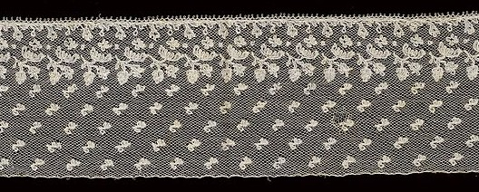 Klöppelspitze mit Pikotkante (1790-1810)